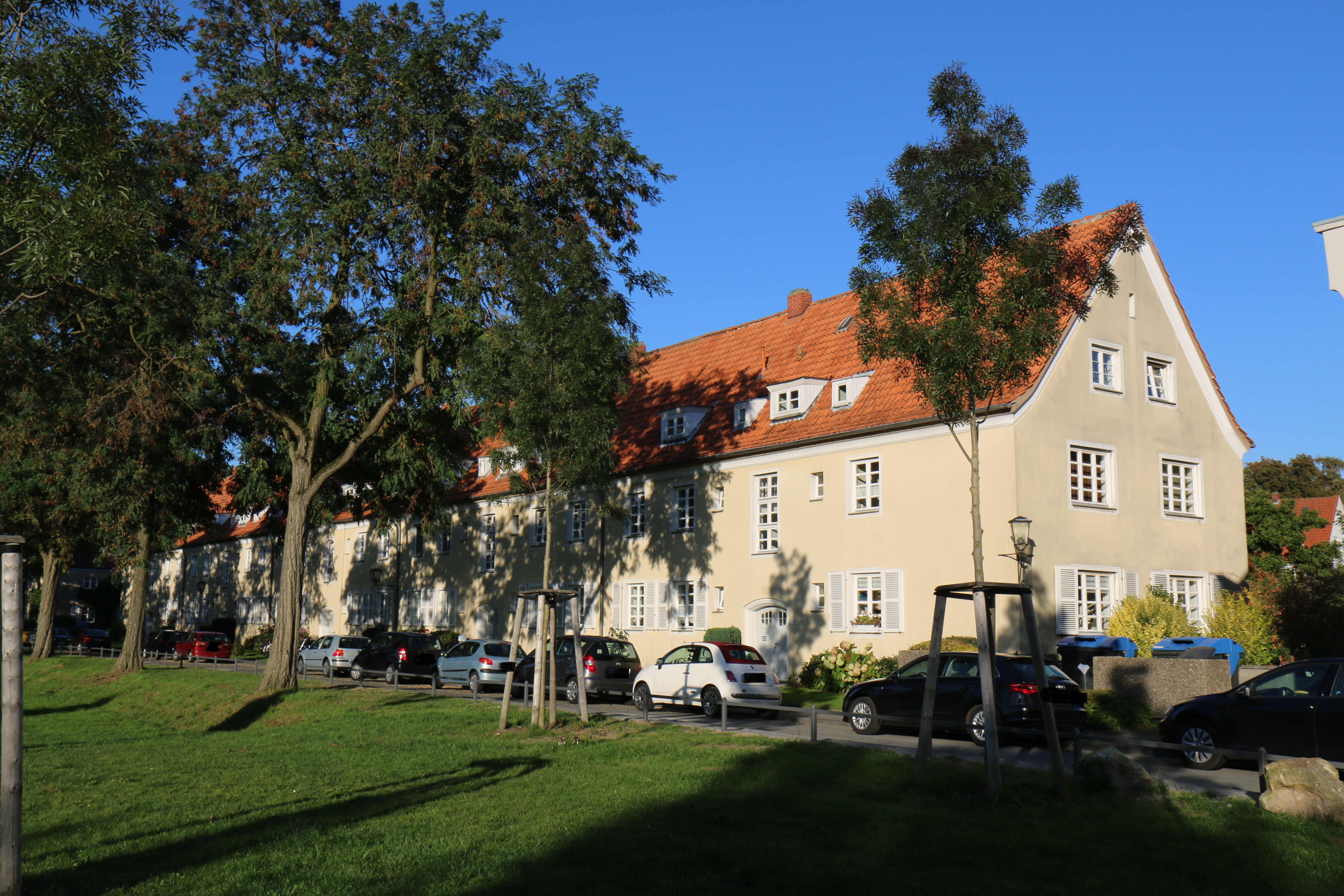 Baudenkmal in Münster (Westf.): Grüner Grund 29-37